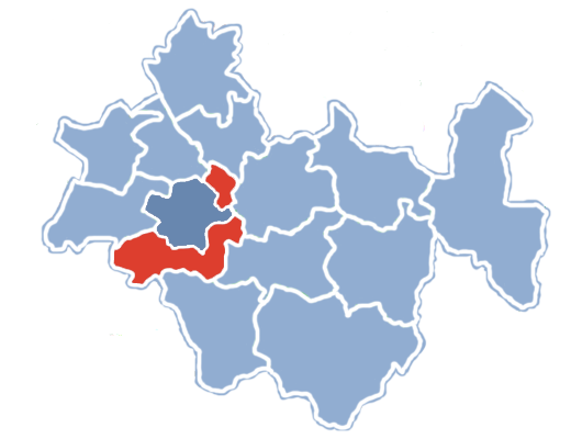 Położenie gminy Radomsko na terenie powiatu radomszczańskiego.